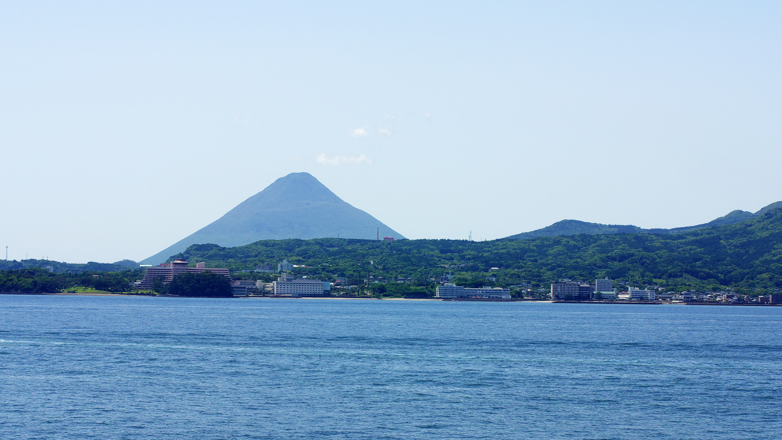 指宿温泉街と開聞岳。フェリーみしま船上より撮影。16:9にトリミング。